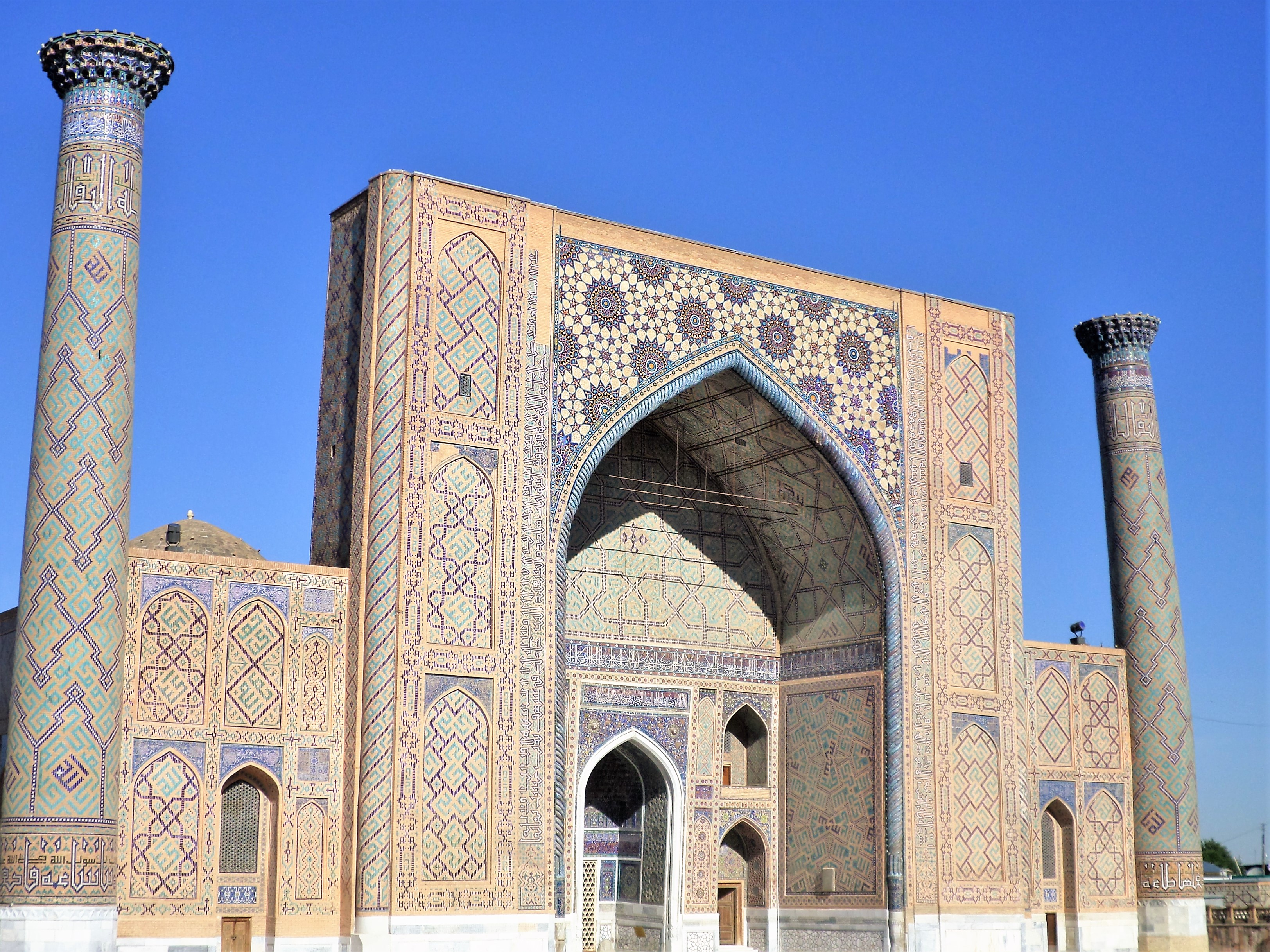 Registan Ulugbek madrasah медресе Улугбека 2014г.